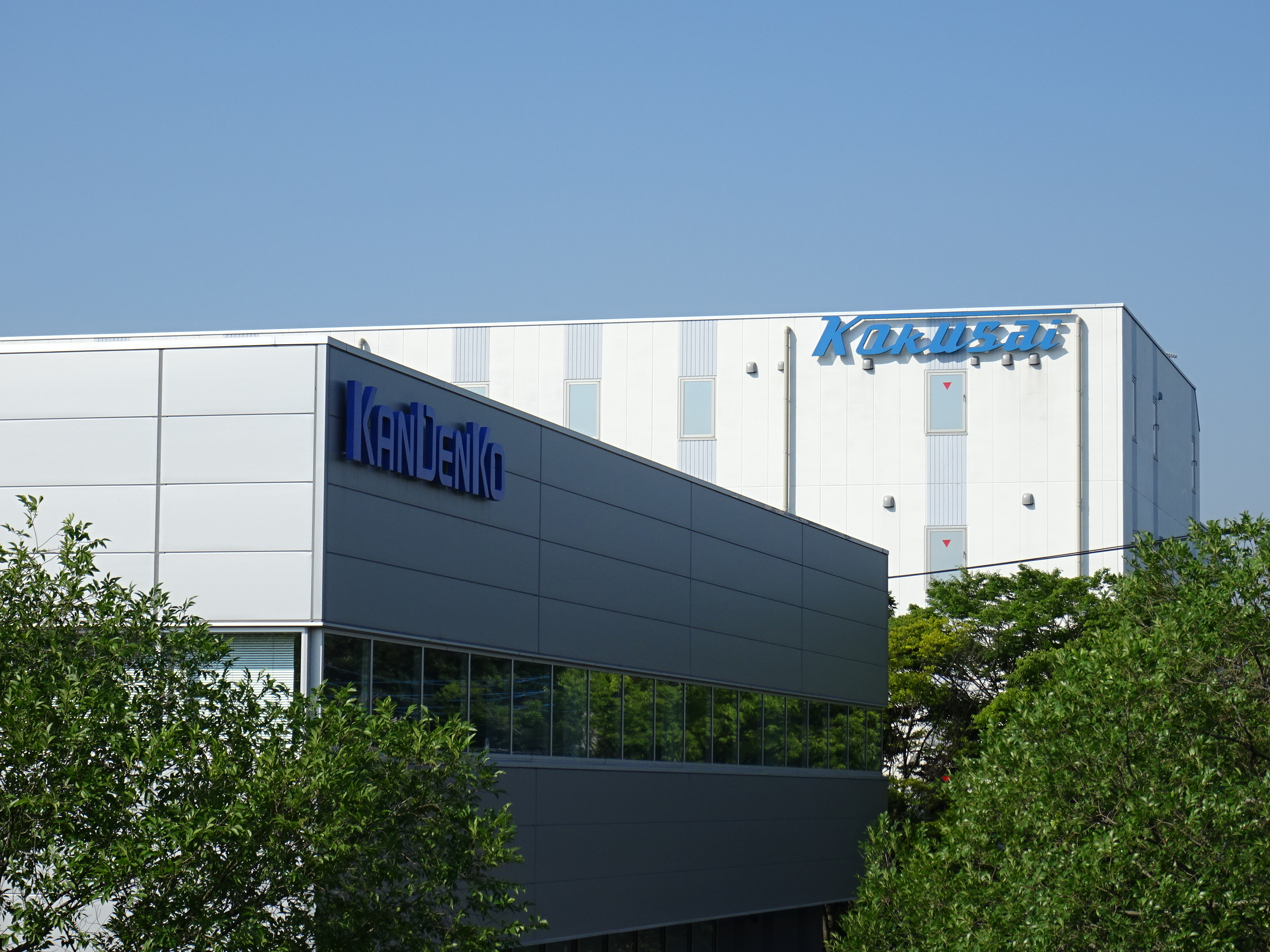 多摩ニュータウンのサービスインダストリー地区（15/07/10撮影）